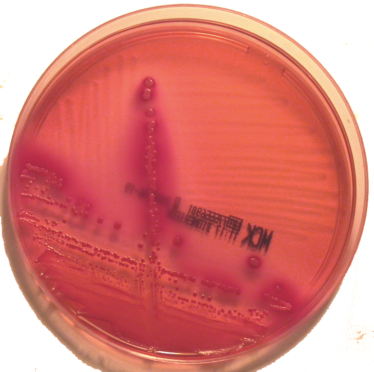 Souche de E.coli sur milieu de Mac Conkey (image personnelle) Philippinjl4 juin 2003